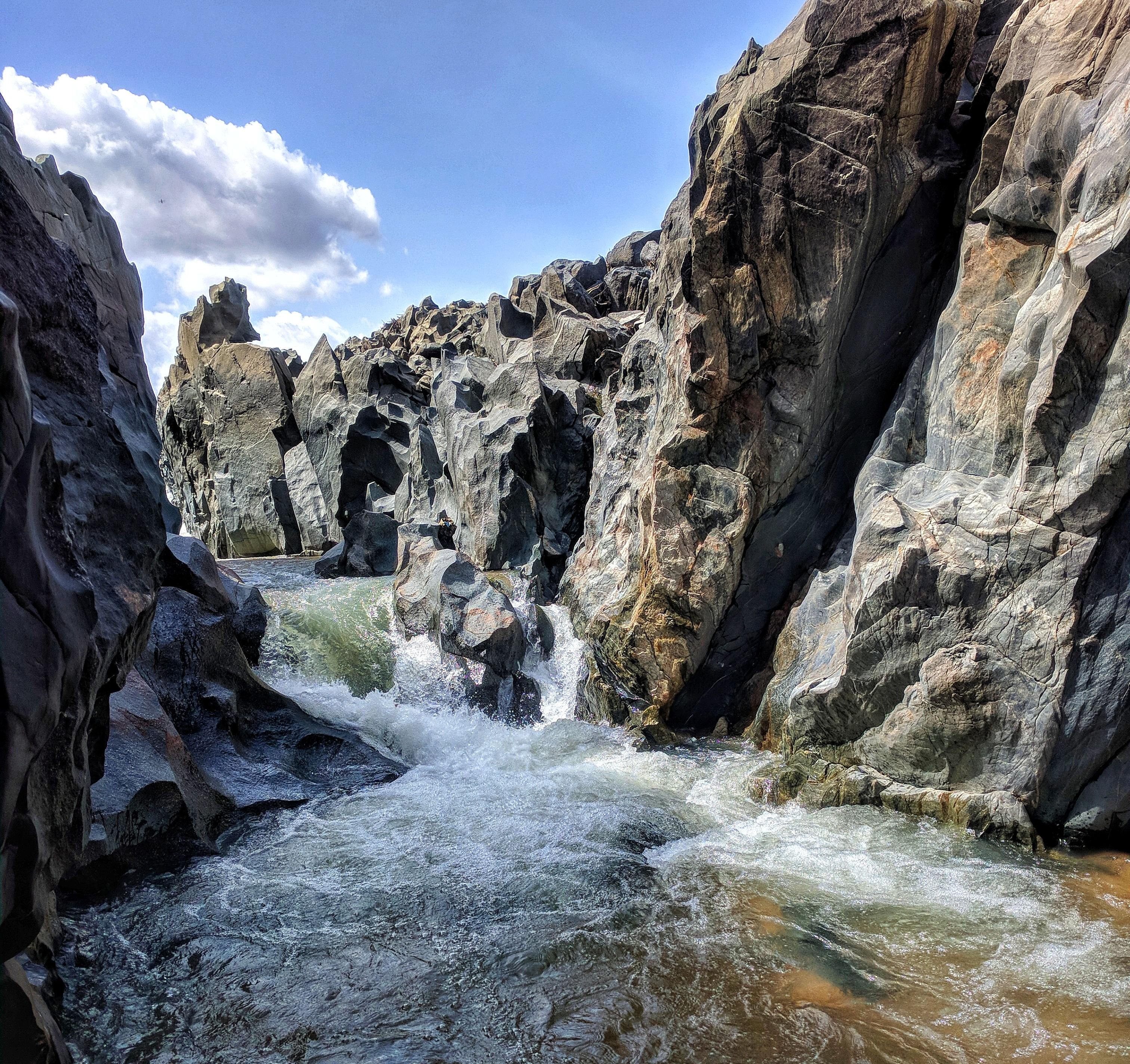 Les Gorges de Kola situé dans le Mayo-Louti à 5,2km de la ville de Guider